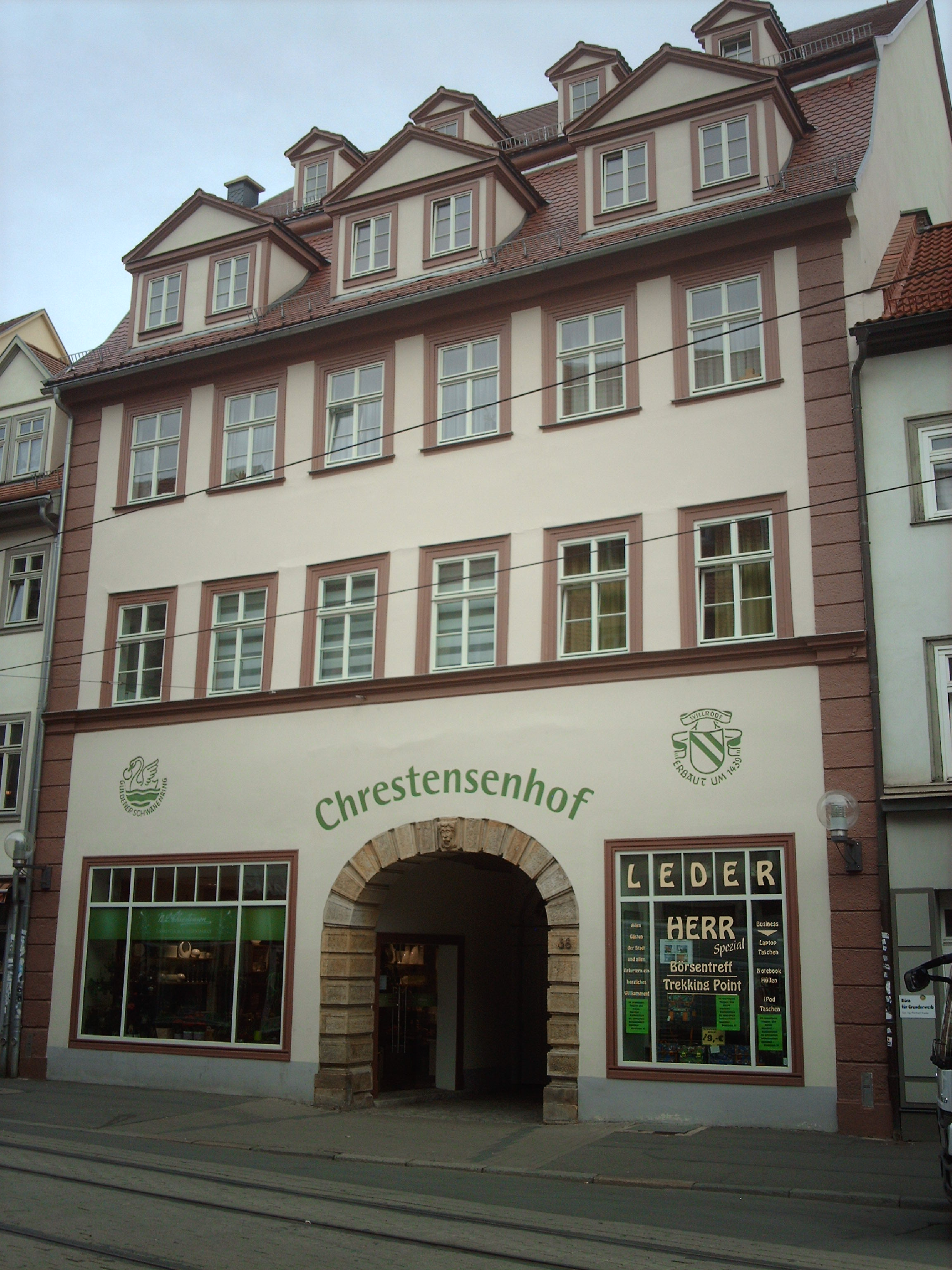 Der Chrestensenhof, Marktstraße 38 in Erfurt.